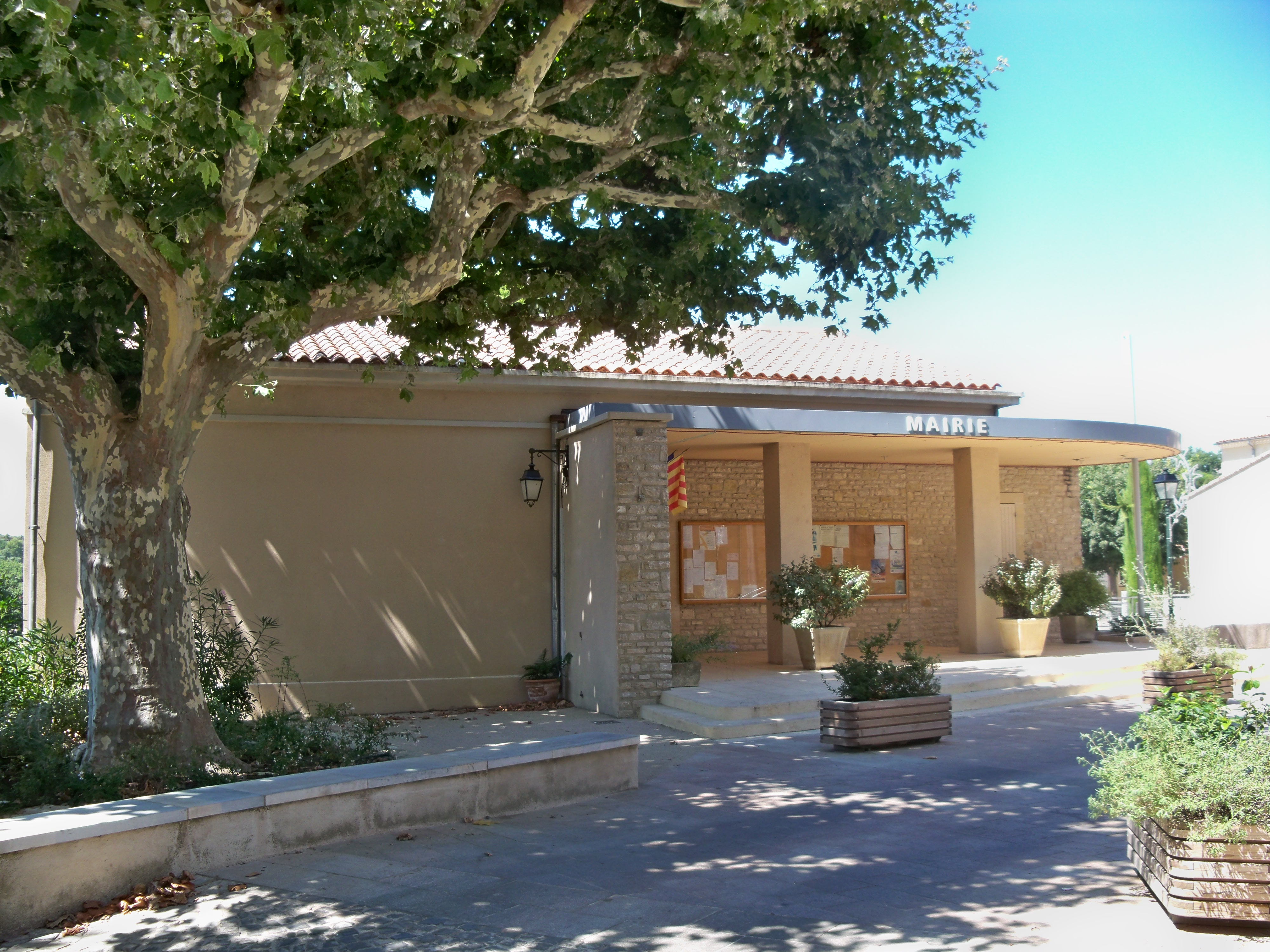 Mairie de Saint Romain en Viennois, Vaucluse, France